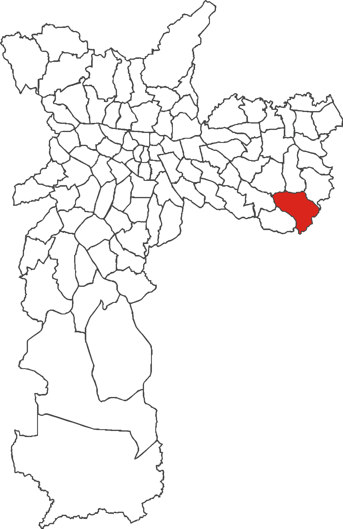 Localização do distrito de Iguatemi no município de São Paulo.